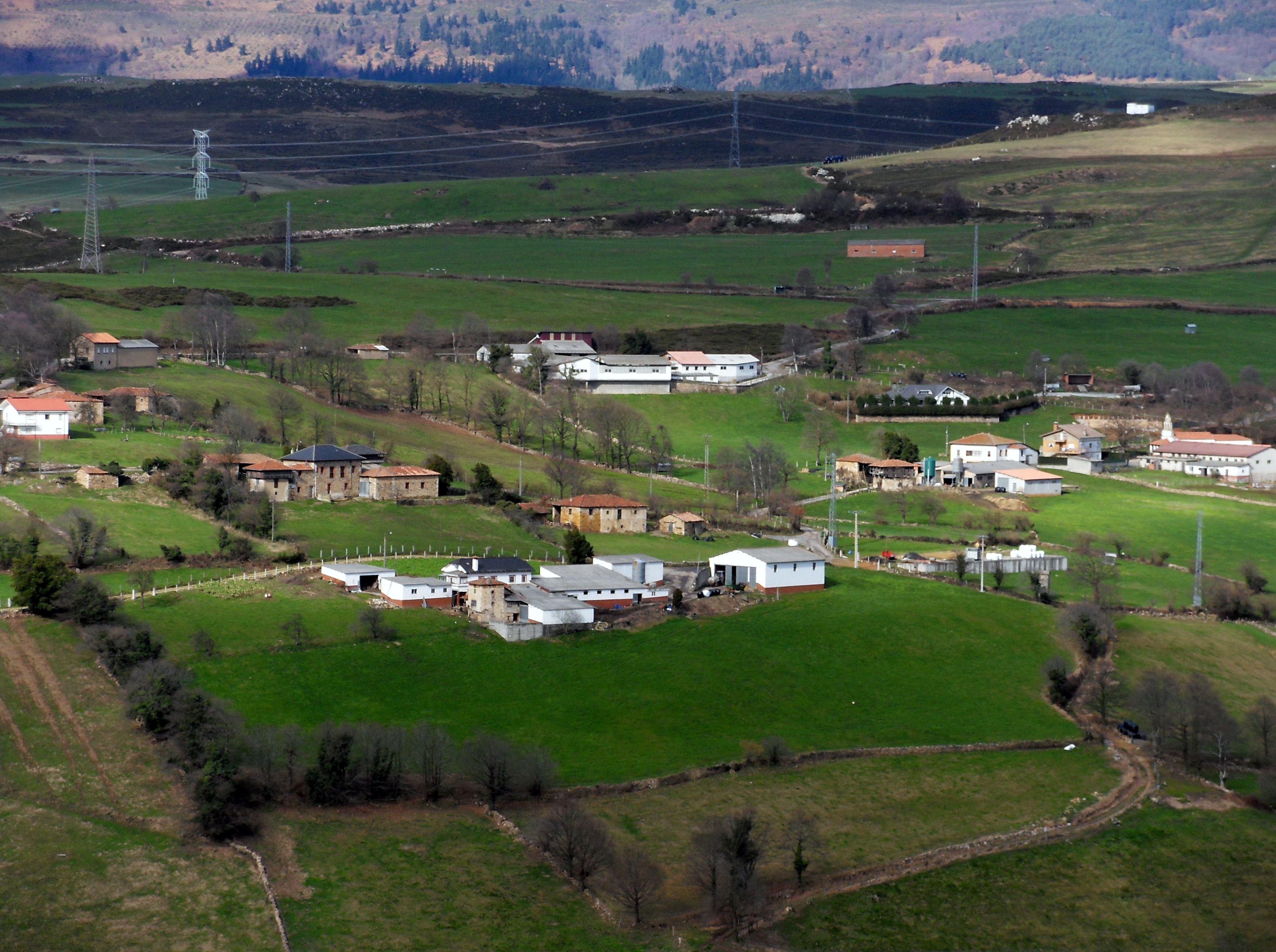 Vista de nieres